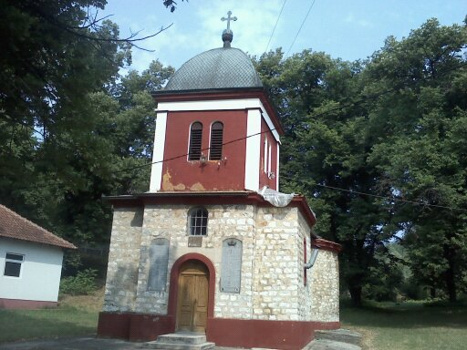 Crkva Svete Ane u Žirovnici.